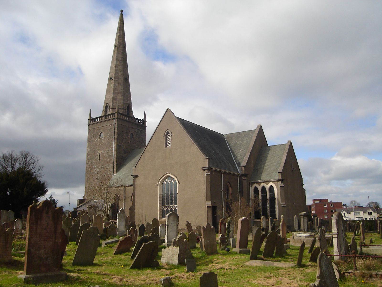 Bangor Abbey